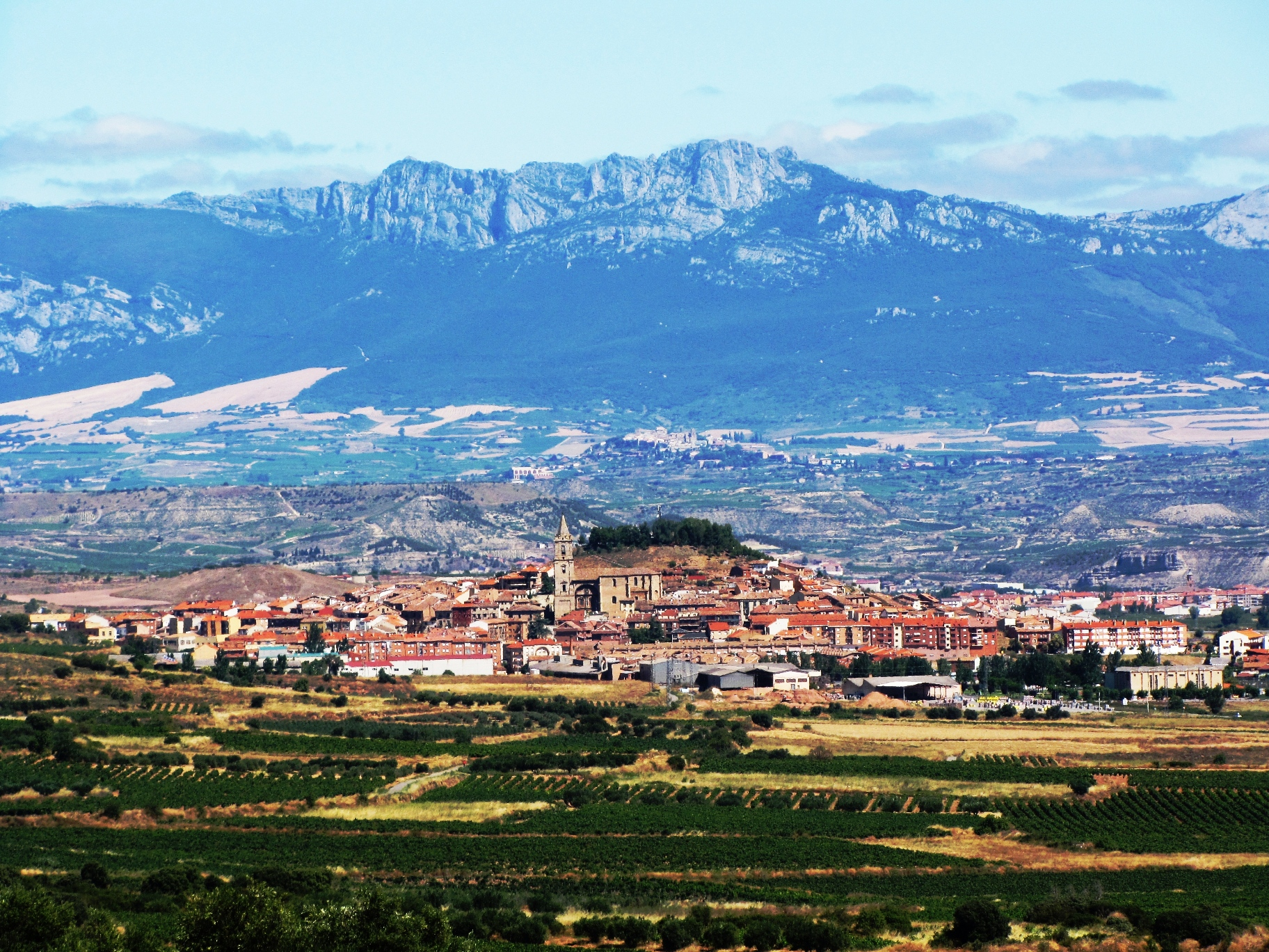 Navarrete visto desde el cerro de las bodegas de Medrano. Detrás se aprecia la localidad de Laguardia en lo alto de una colina. Como telón de fondo se alza la Sierra de Cantabria